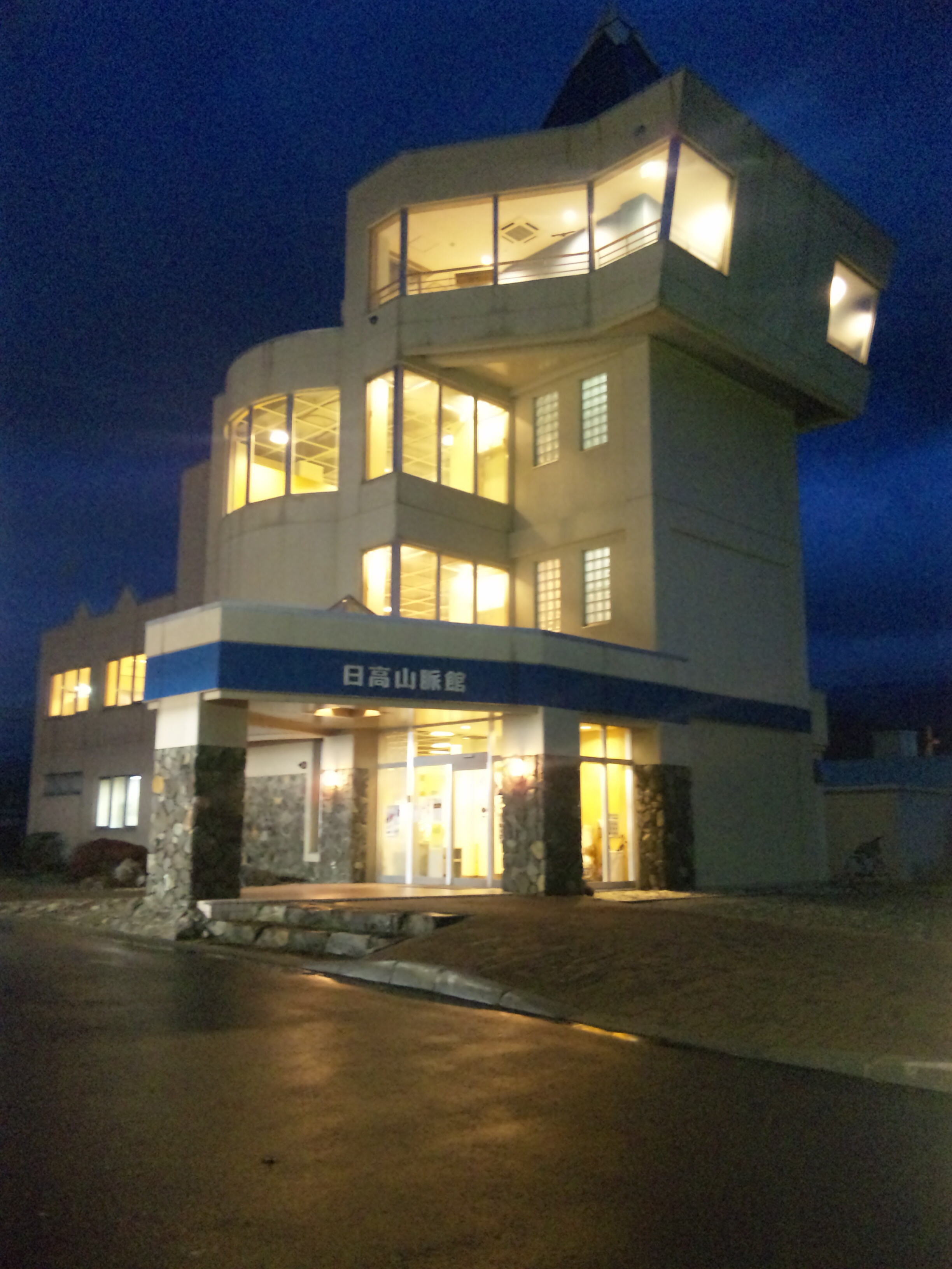 日高山脈館の外観（夜）